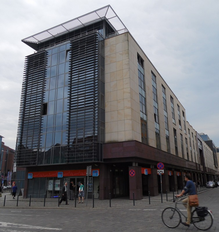 NOWOCZESNY GMACH.